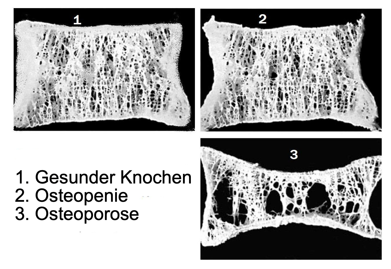 Entwicklungsstadien einer Osteoporose